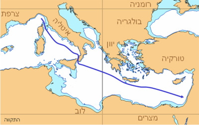 אוניית המעפילים התקוה - מסלול